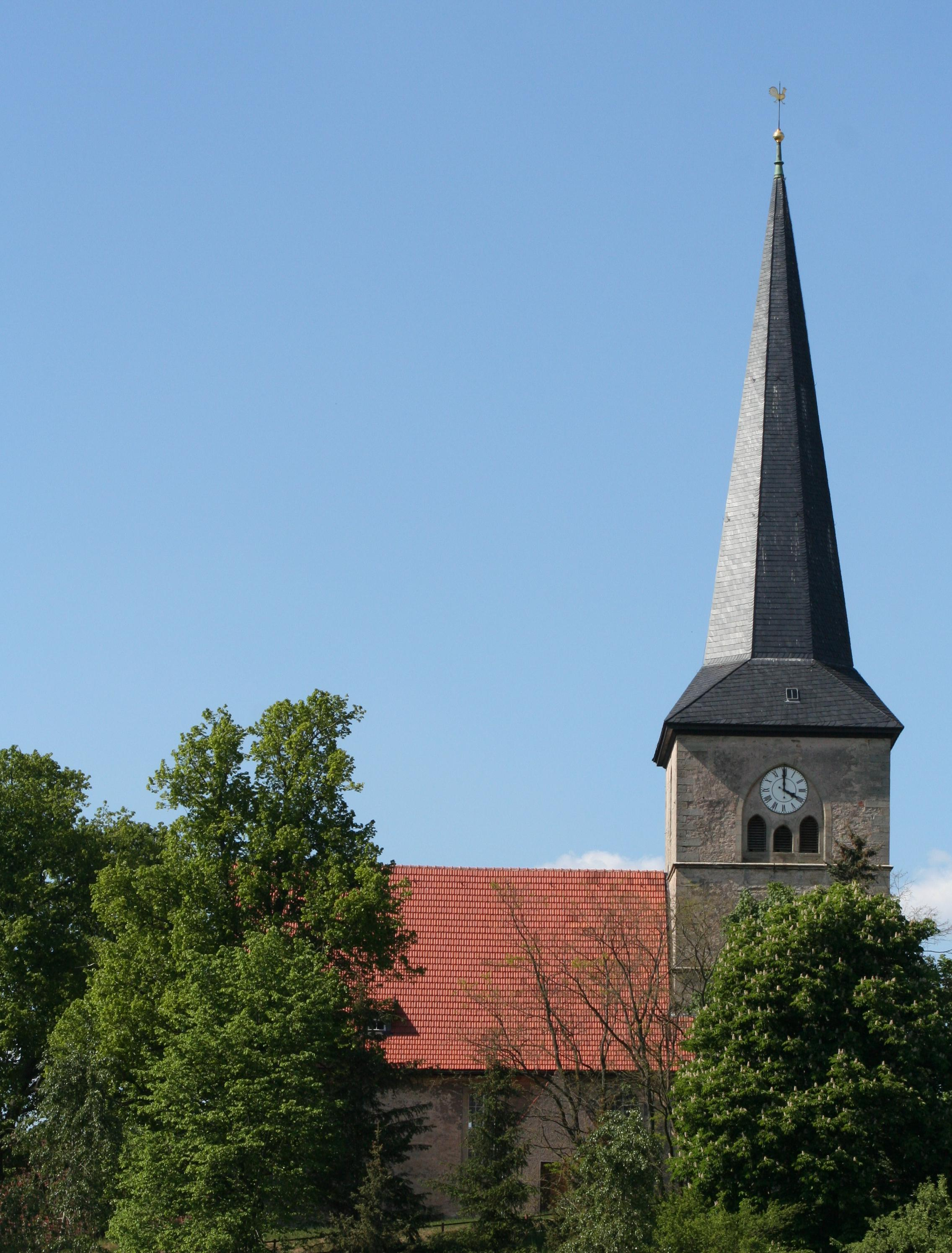 ev. Trinitatiskirche Veilsdorf evangelische Trinitatiskirche in Veilsdorf, Landkreis Hildburghausen